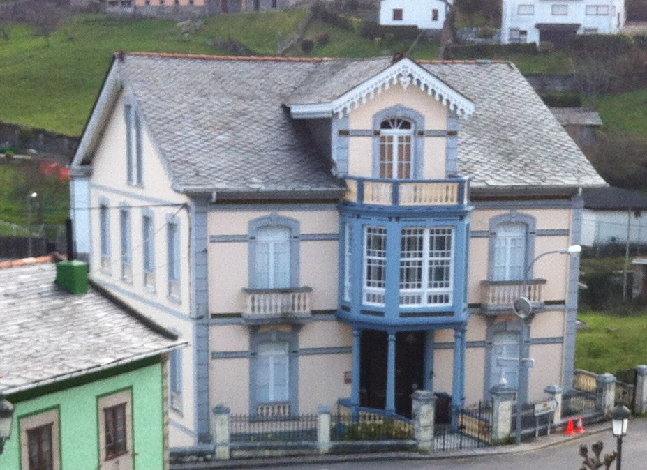 Casa de Sanzo (antiguu Casino de Boal demientres la Segunda República), na villa de Bual (Asturies)